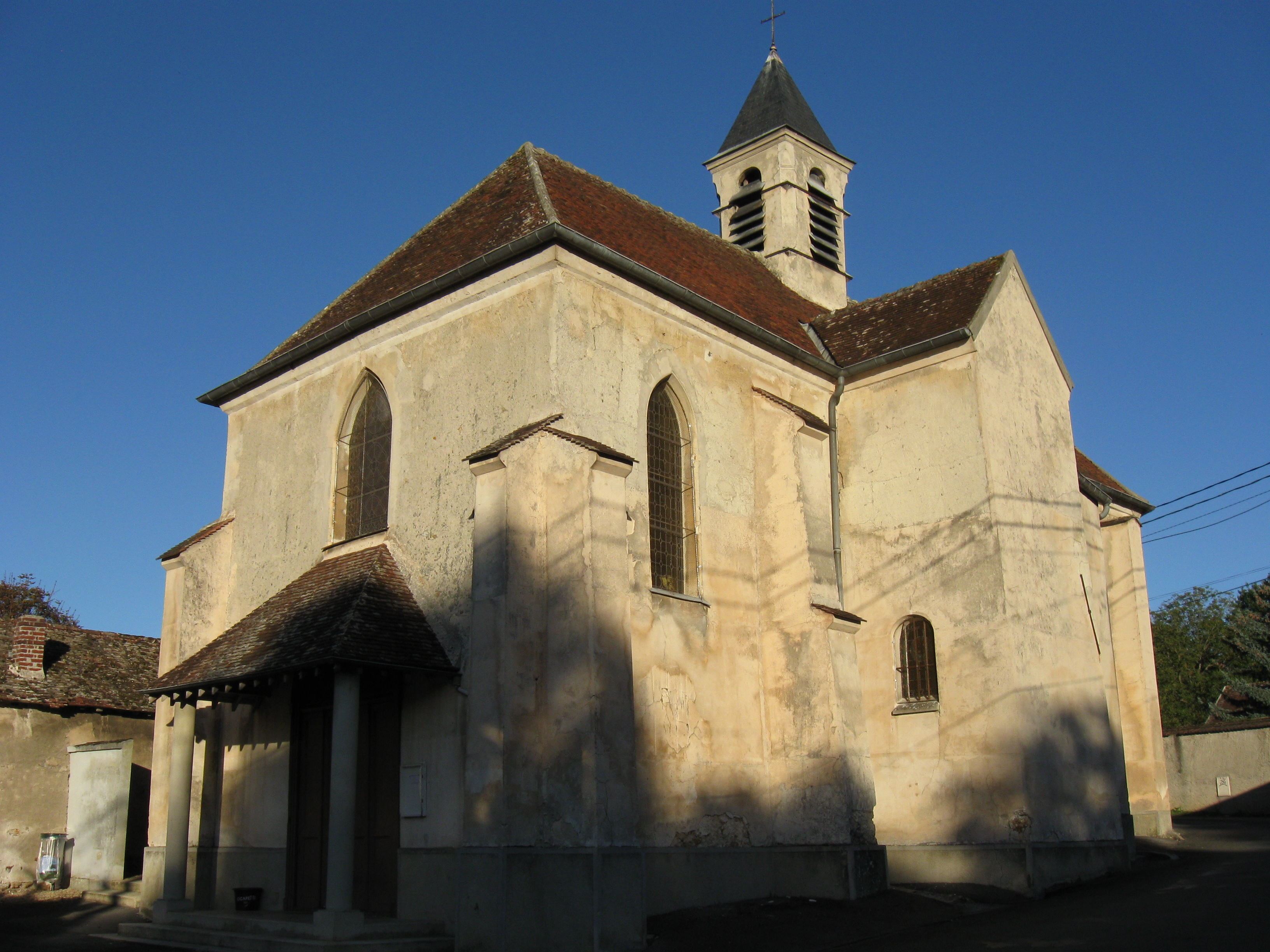 Église catholique Saint-Jacques-et-Saint-Philippe. (Reuil-en-Brie, département de la Seine et Marne, région Île-de-France).